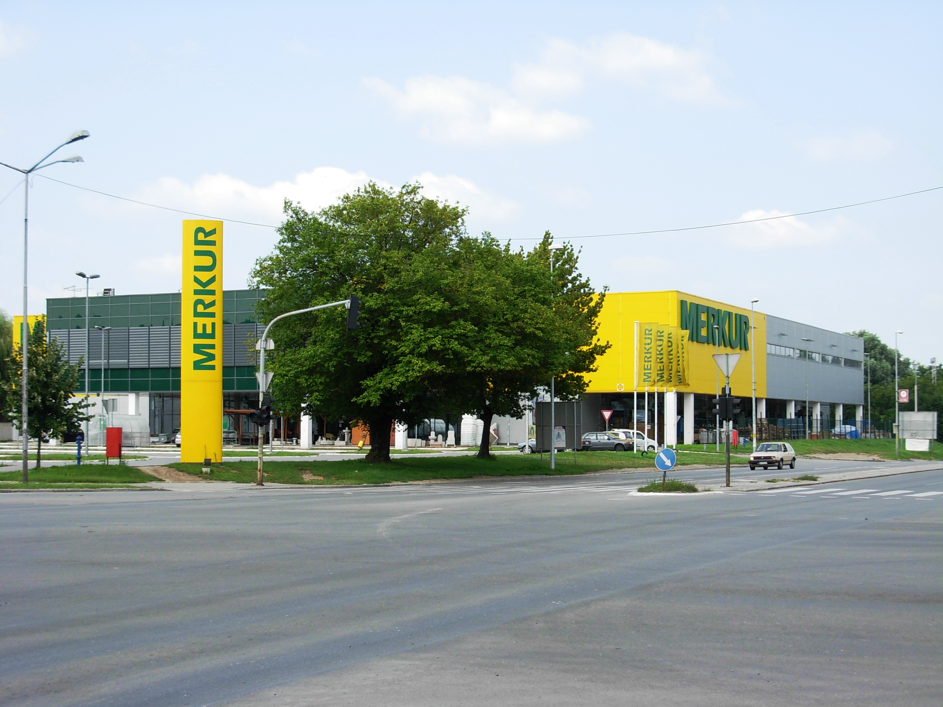 Tržni centar "Merkur", Novi Sad